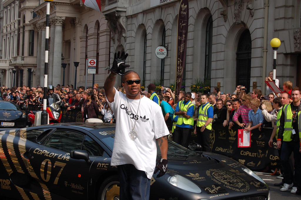 Xzibit